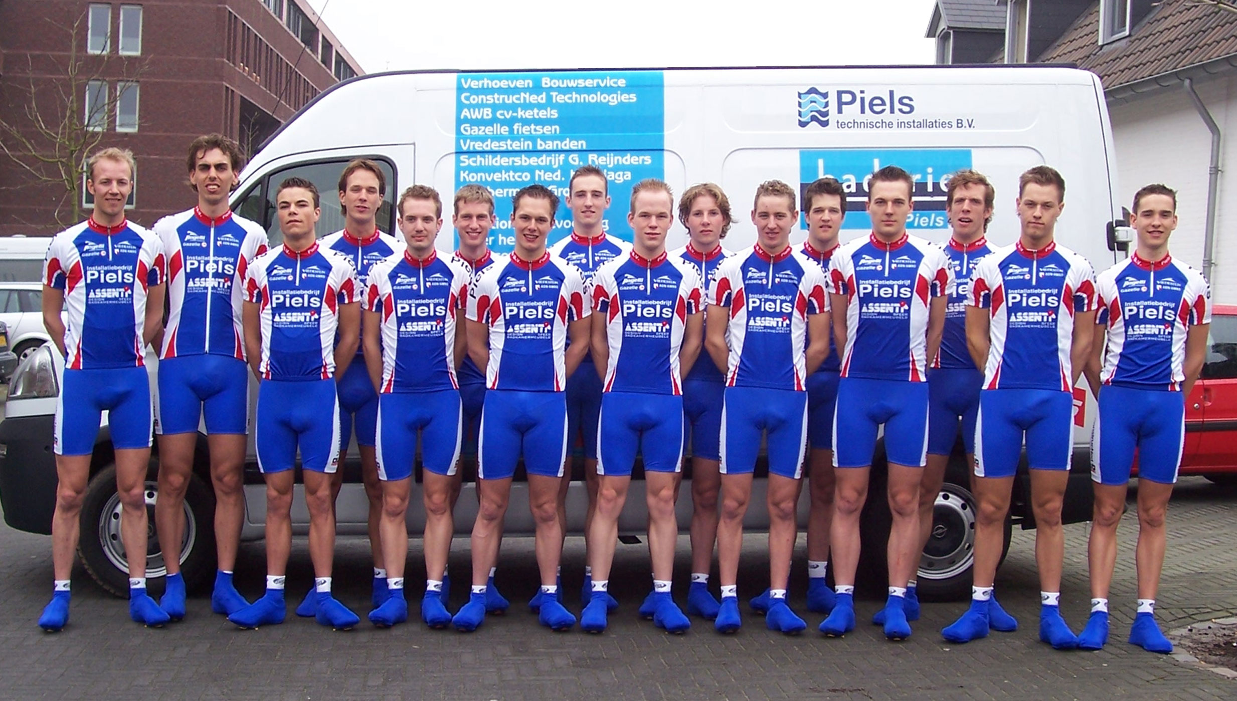 Deze foto is gemaakt door Glenn Bock op 20 februari 2007.